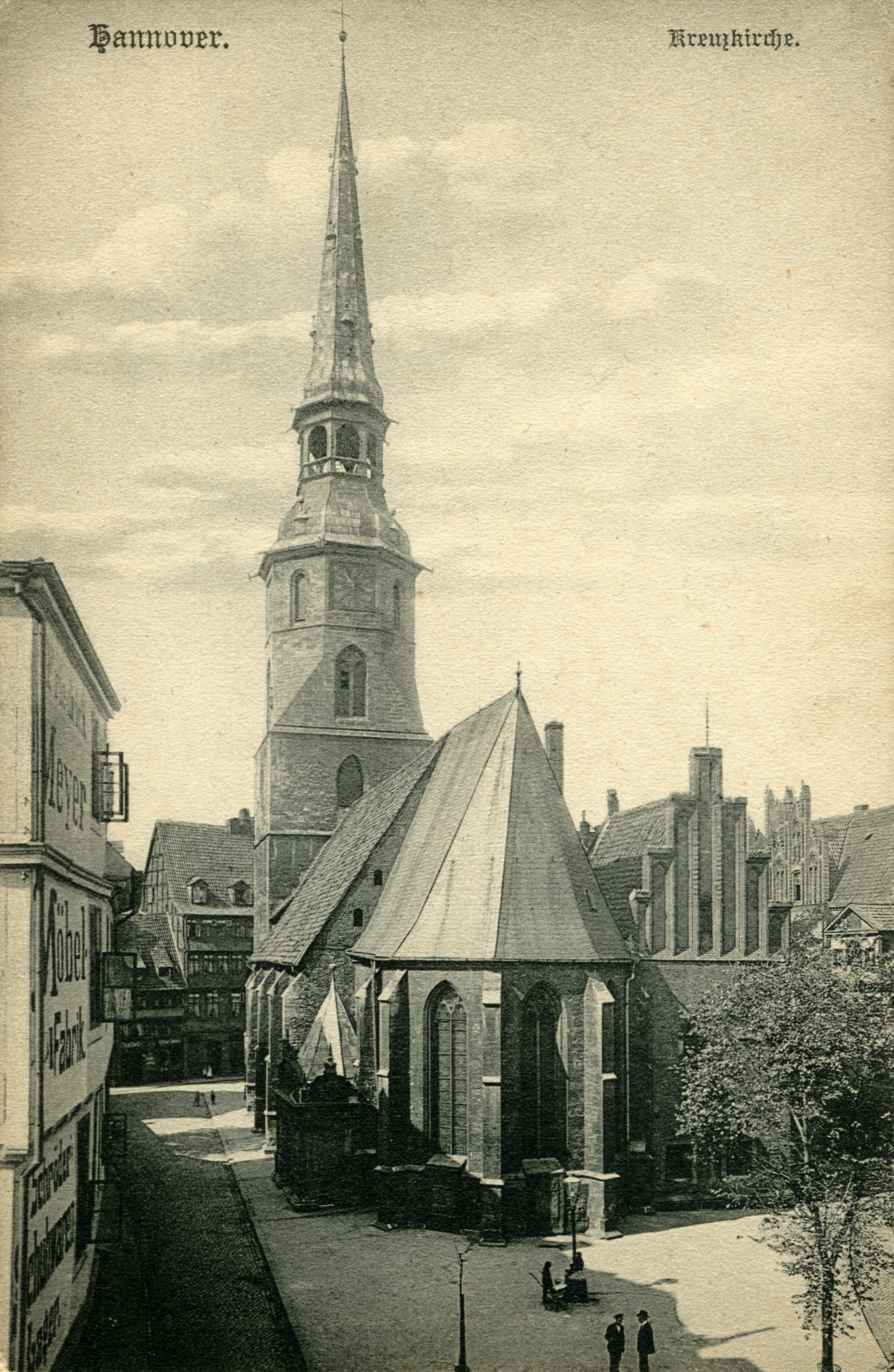 Ansichtskarte Nummer "1034" von Karl F. Wunder, um 1900. Zu sehen ist Kreuzkirche mit dem heute nicht mehr vorhandenem Anbau (des Gemeindehauses?). Im Vordergrund wäre heute eine Rasenfläche mit Grabsteinen zu sehen, die es so offensichtlich um 1900 gar nicht (mehr) gab. Am Ende des (heutigen) Ganges Kreuzkirchhof wäre heute die Kreuzklappe zu sehen als nach dem Zweiten Weltkrieg aufgebauten Teils des Kreuzkirchenviertels.